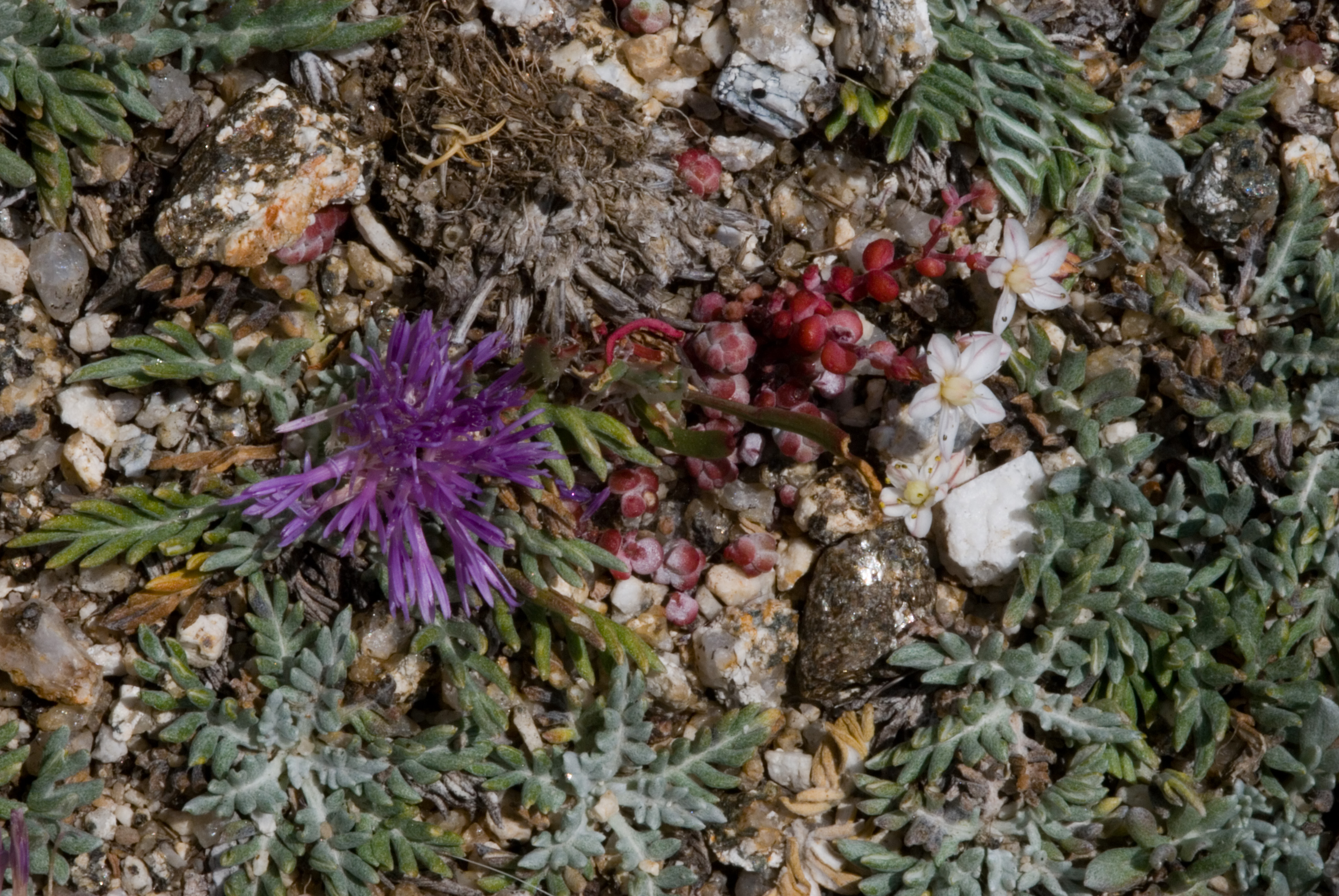 Tomada en la Sierra de Gredos (Ávila, Península Ibérica)